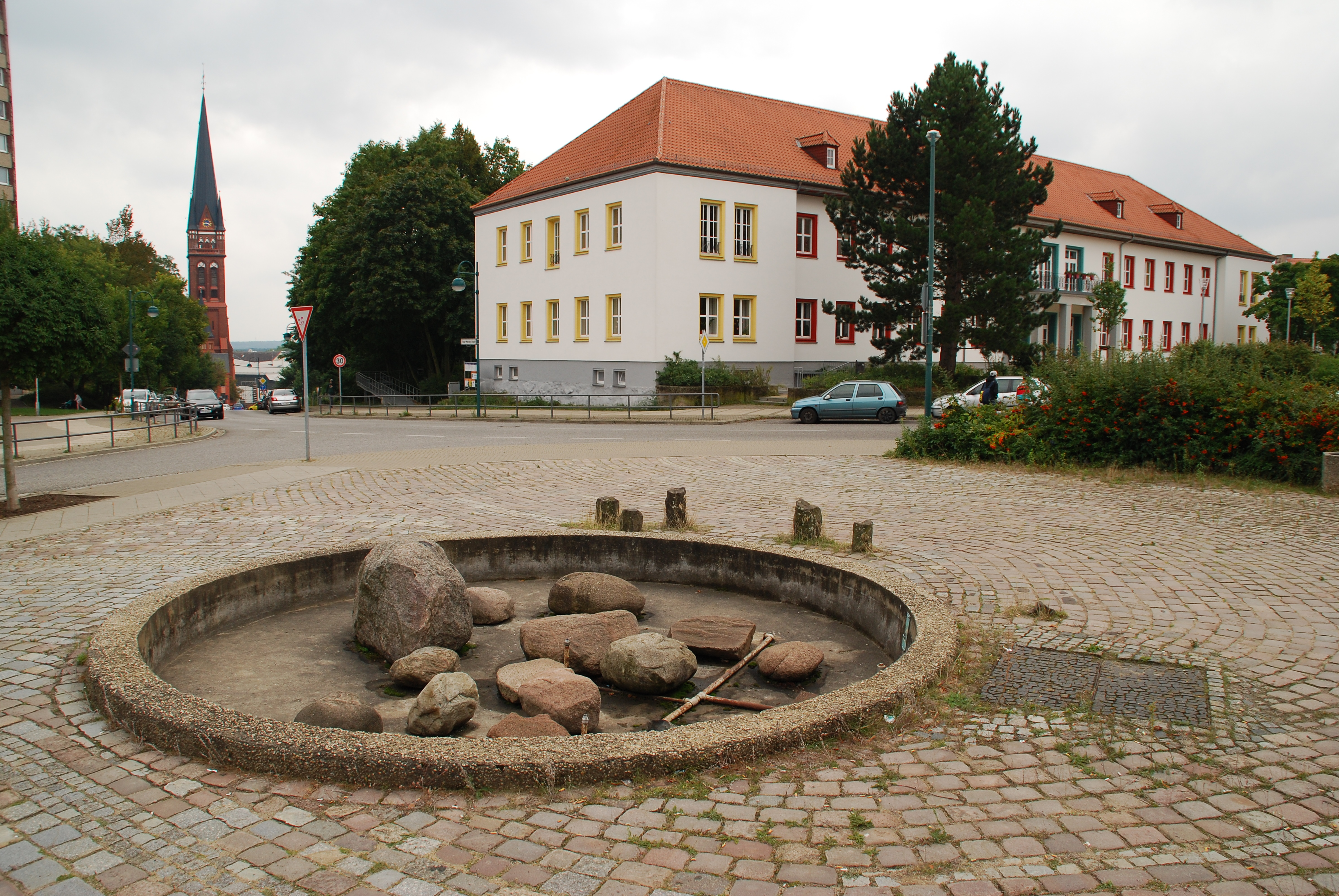 Oderlandbrunnen Frankfurt (Oder), Franz-Mehrung-Straße/Wieckestraße